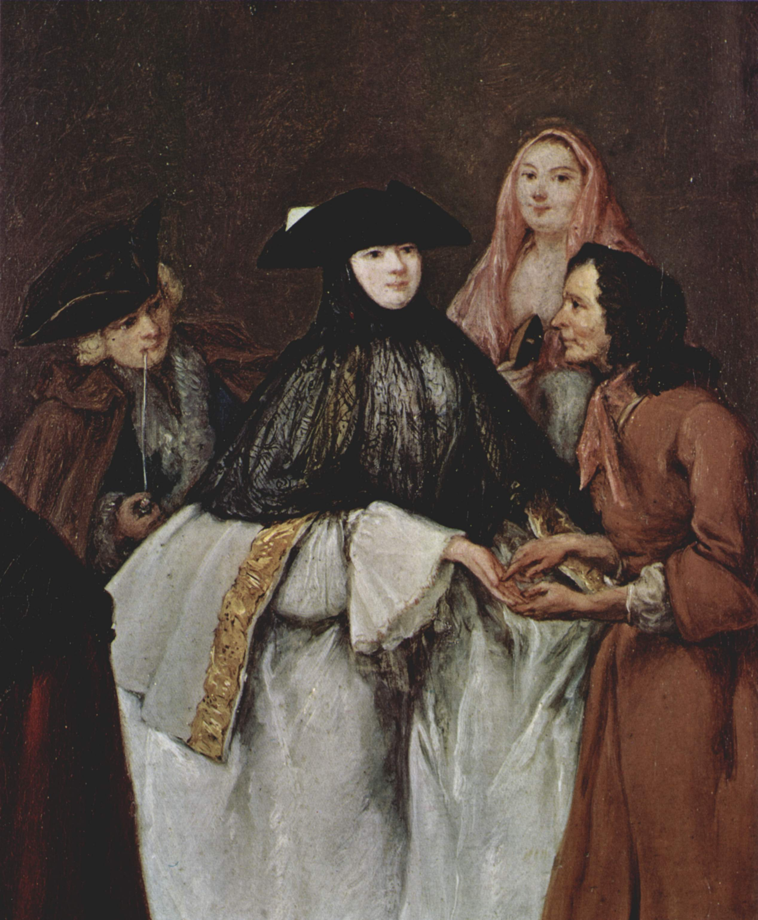 detail